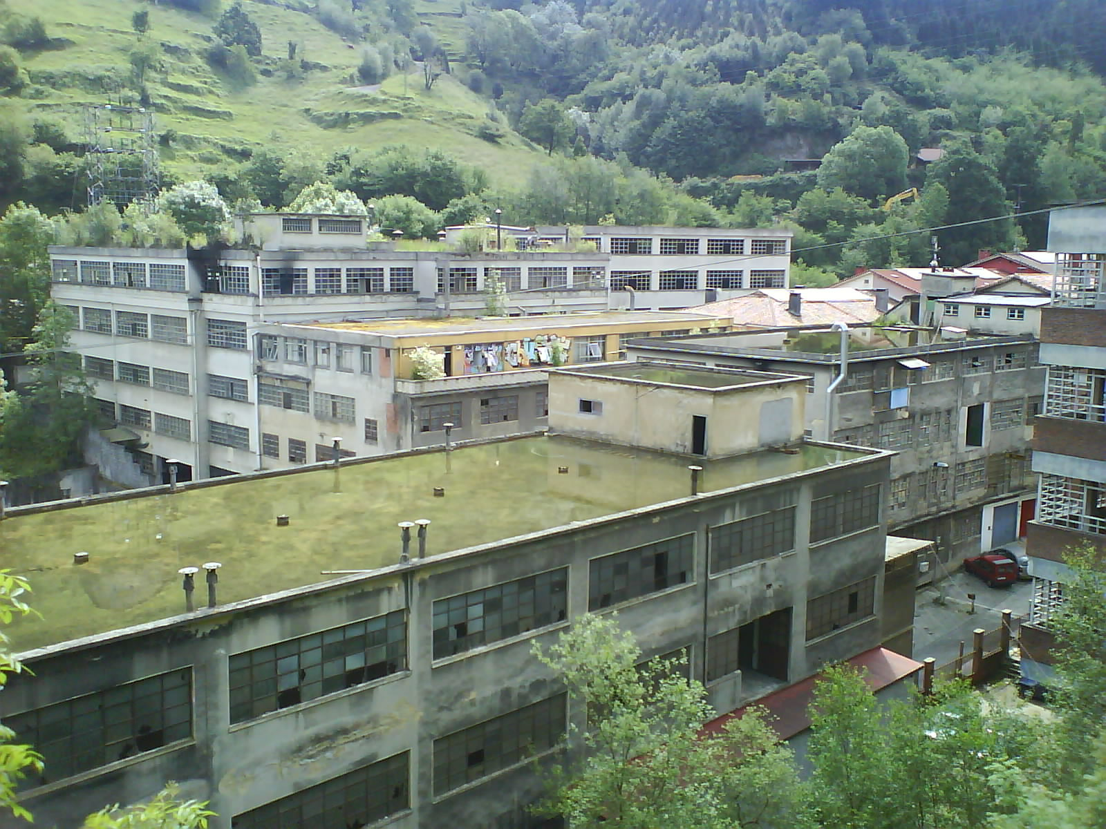 Edificios industriales de la calle Txonta en Eibar, Guipúzcoa (País vasco) (España).